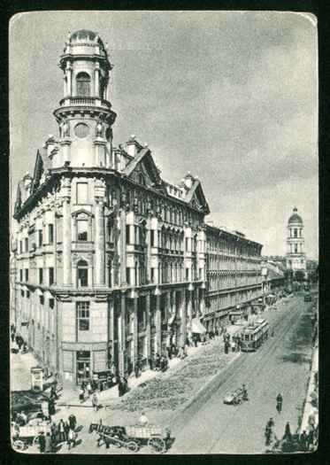 Открытка с видом Загородного проспекта от Пяти углов